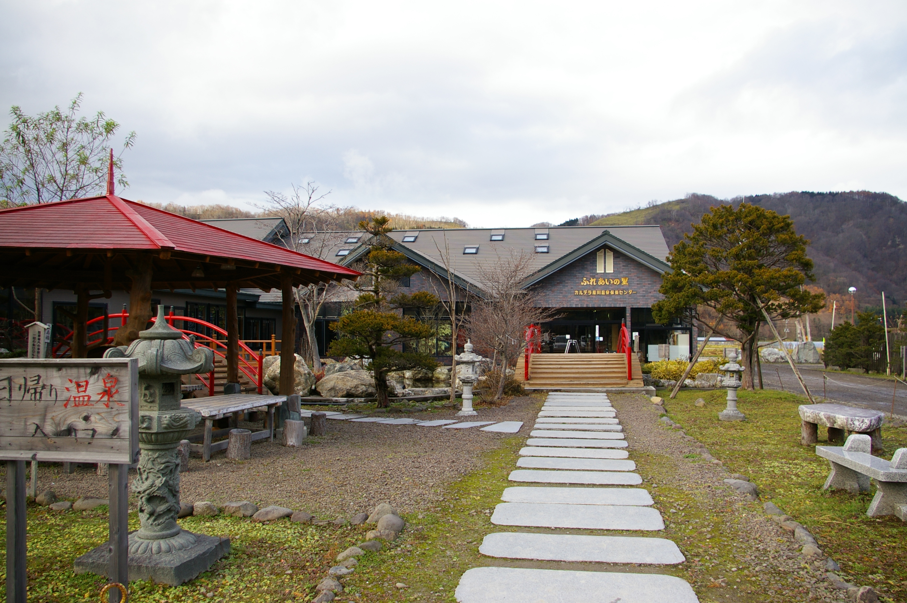 濁川温泉保養センター